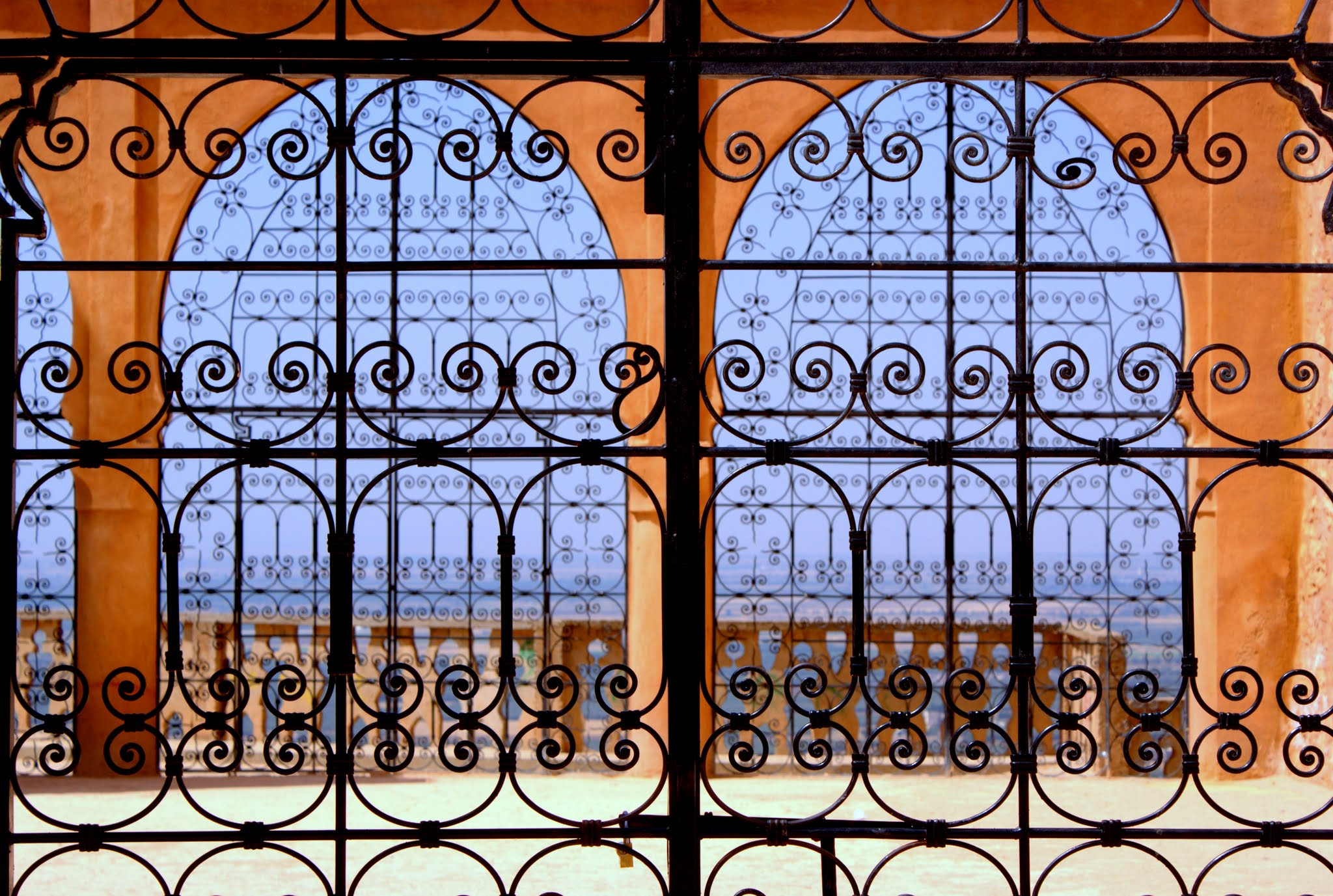 Beni-Mellal, Morocco